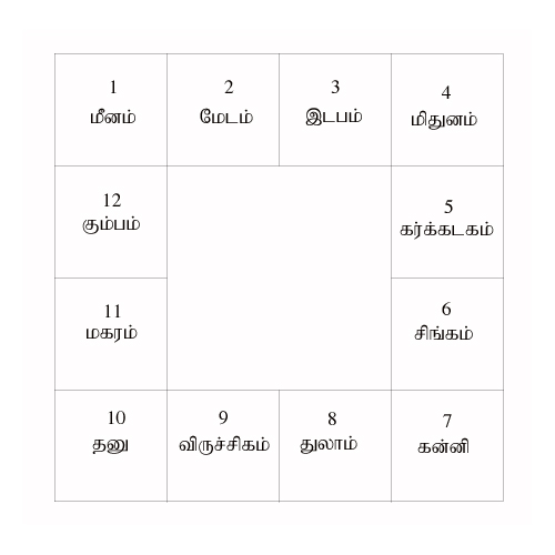 பகுப்பு:தமிழில் விளக்க வரைபடங்கள்